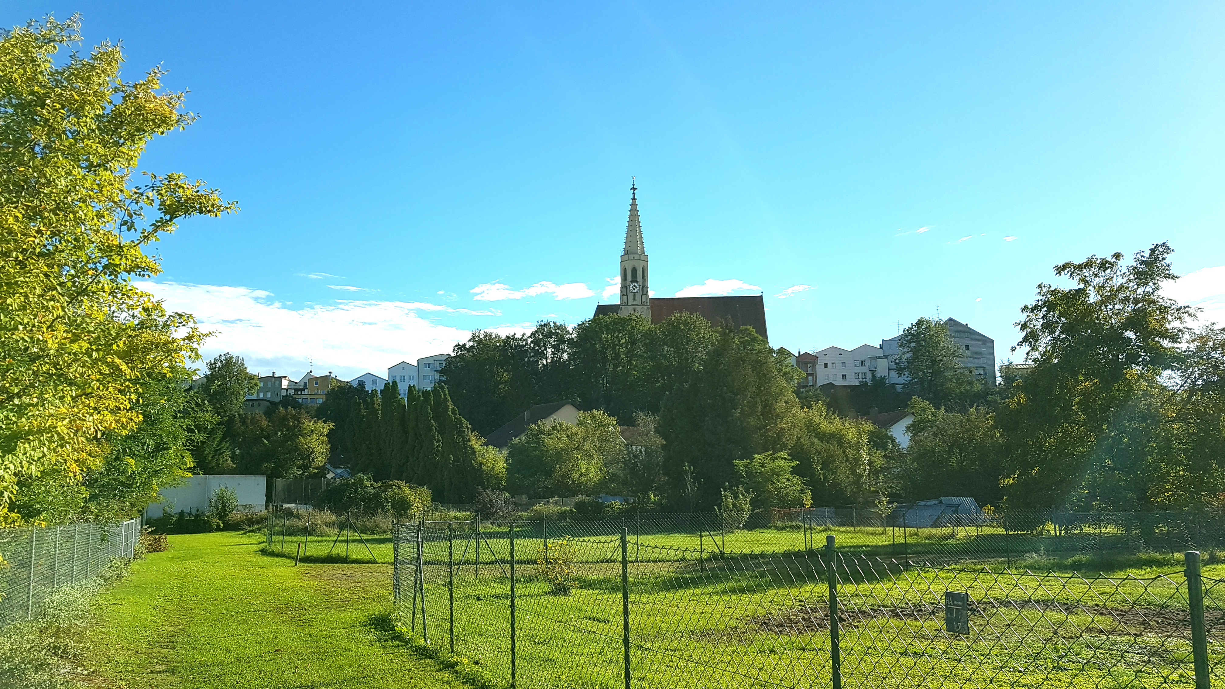 St. Nikolaus (Neuötting)